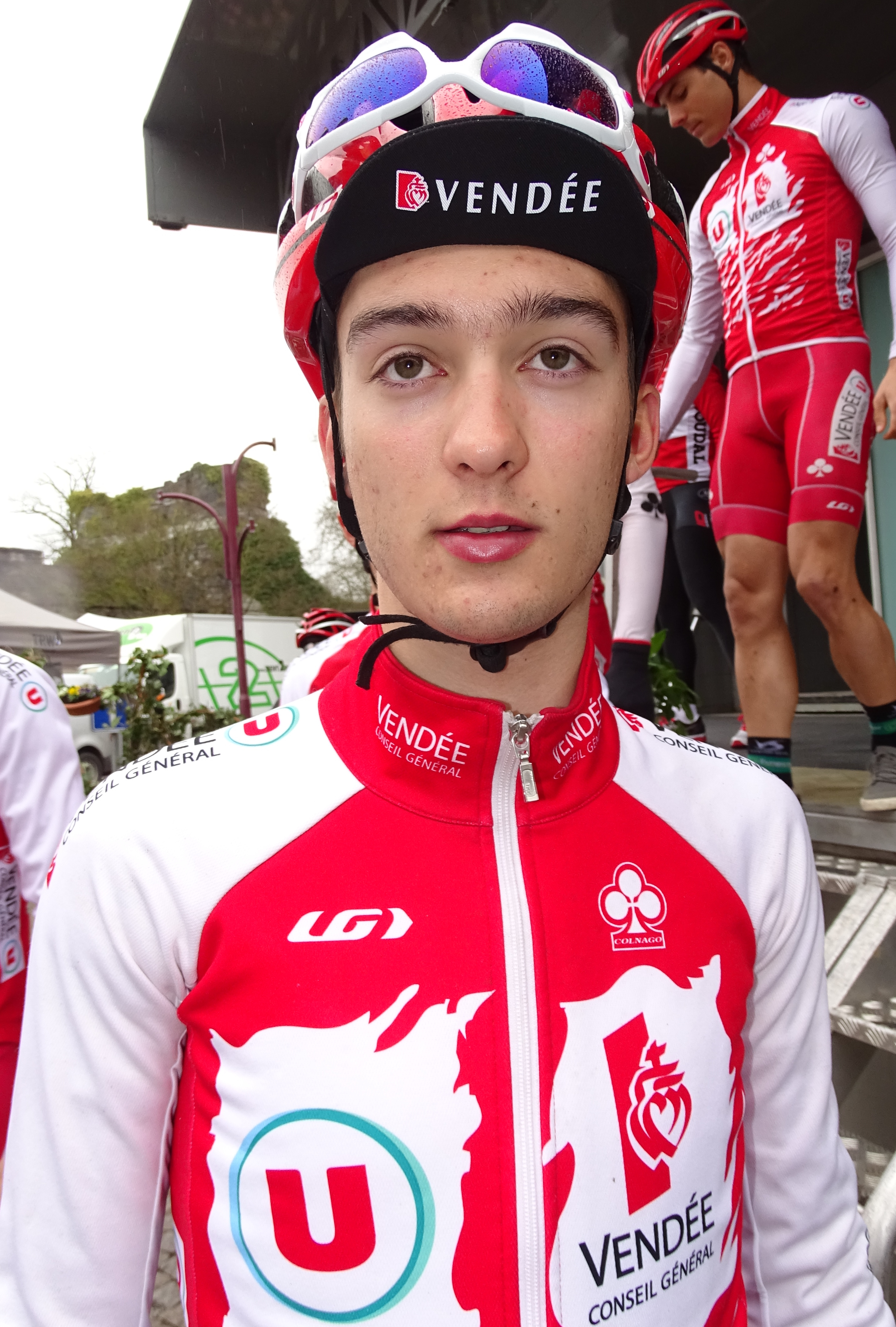 Triptyque des Monts et Châteaux 2015 Depicted person: Marlon Gaillard Depicted team: Vendée U